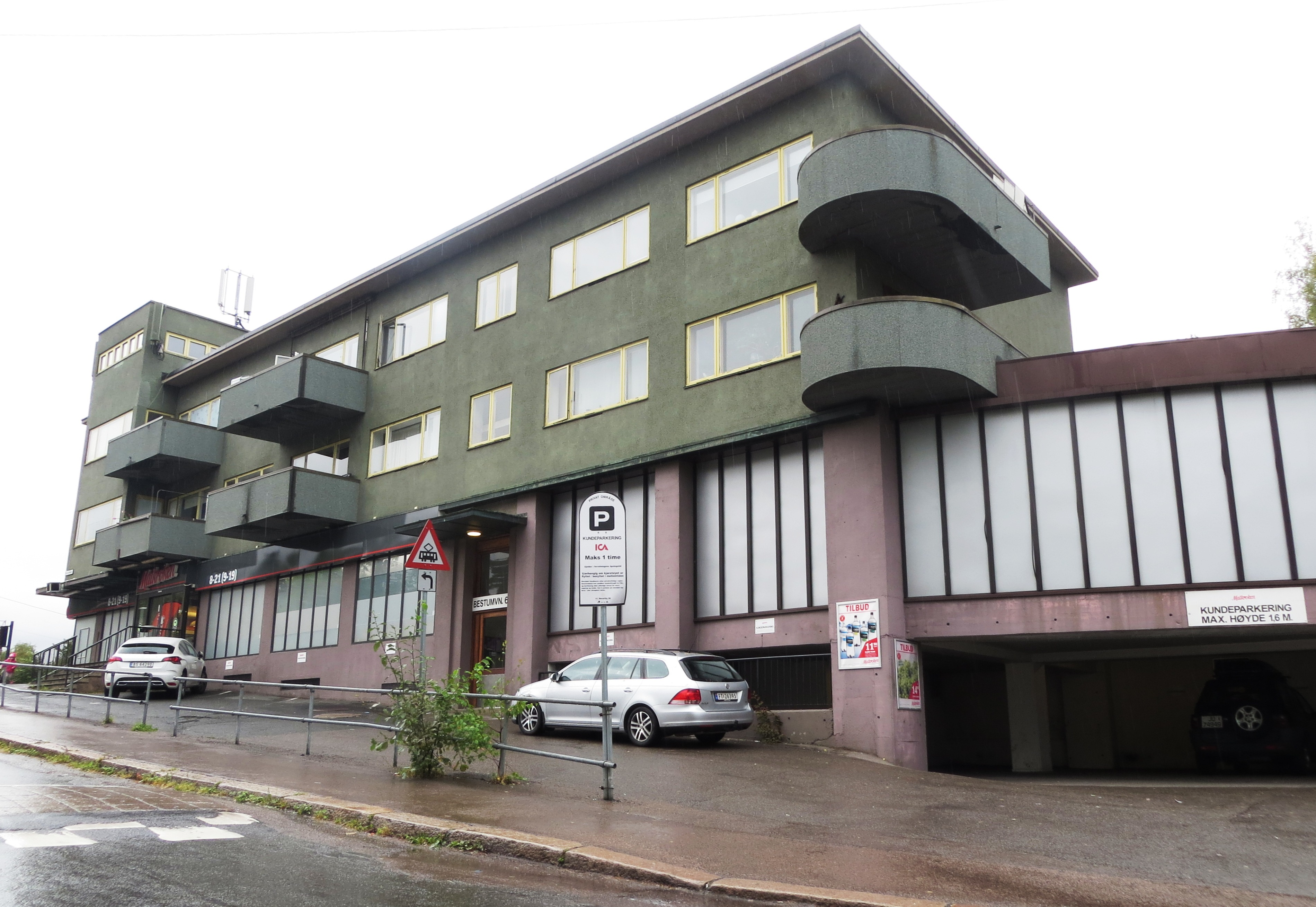 Butikklokale fra 1930-årene, som inneholdt Furulund Bunker omkring andre verdenskrig. Bydel Ullern, Oslo.